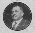 Francisco Amado Juarez, foto de obituario